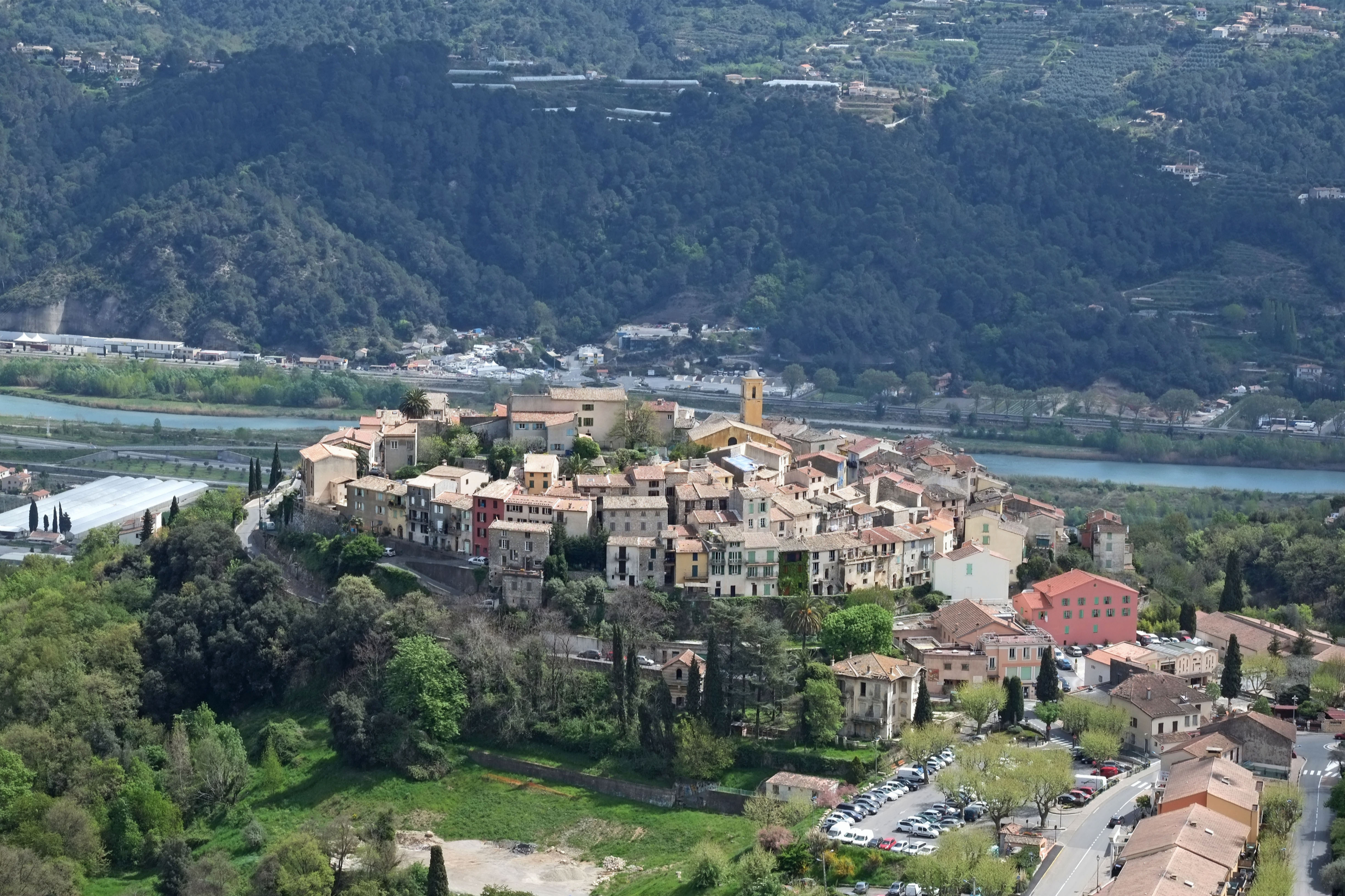 Vue du village de Gattières depuis la vieille route de Carros